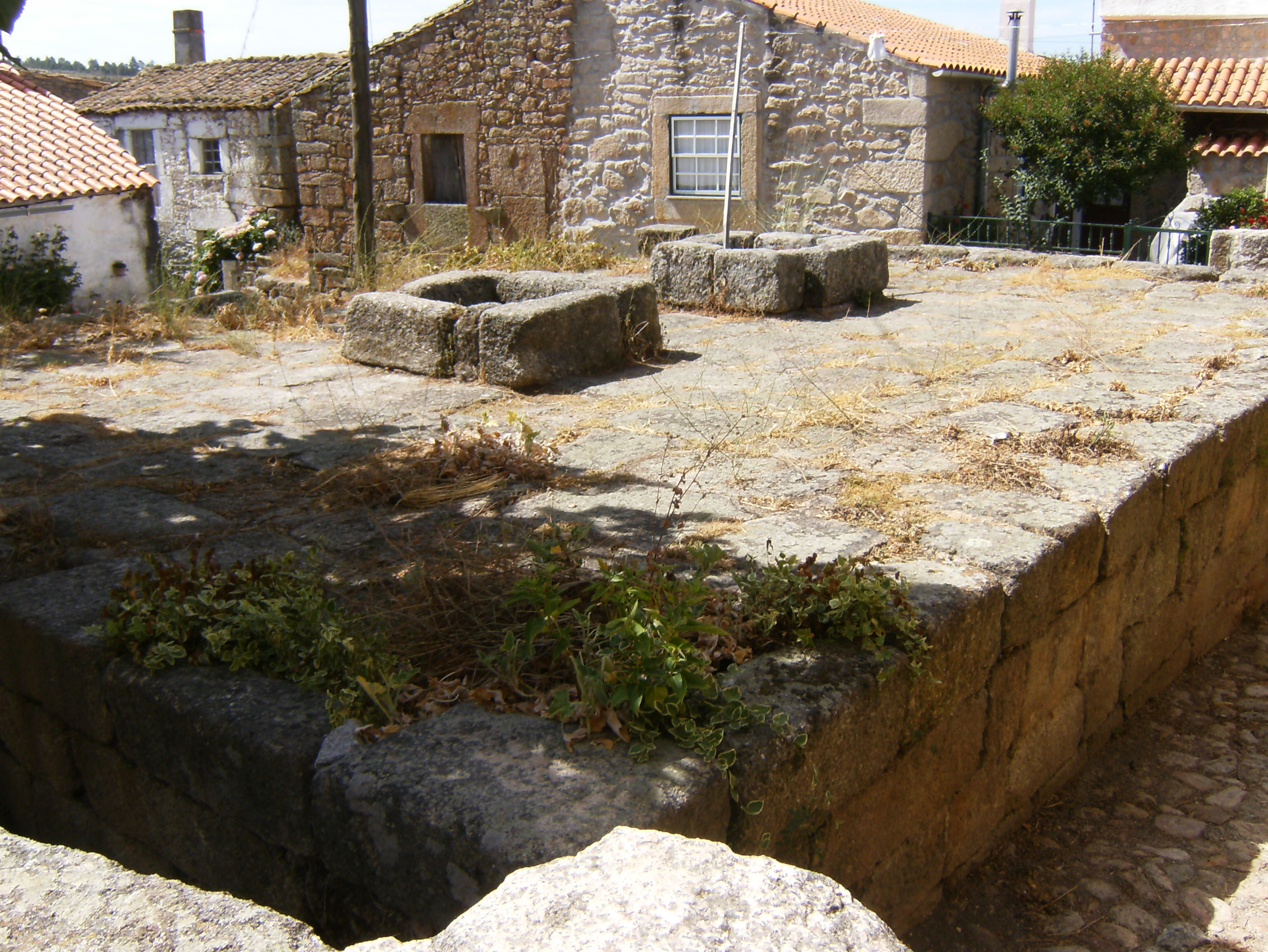 Poço d'El-Rei (século XVII), Castelo Bom